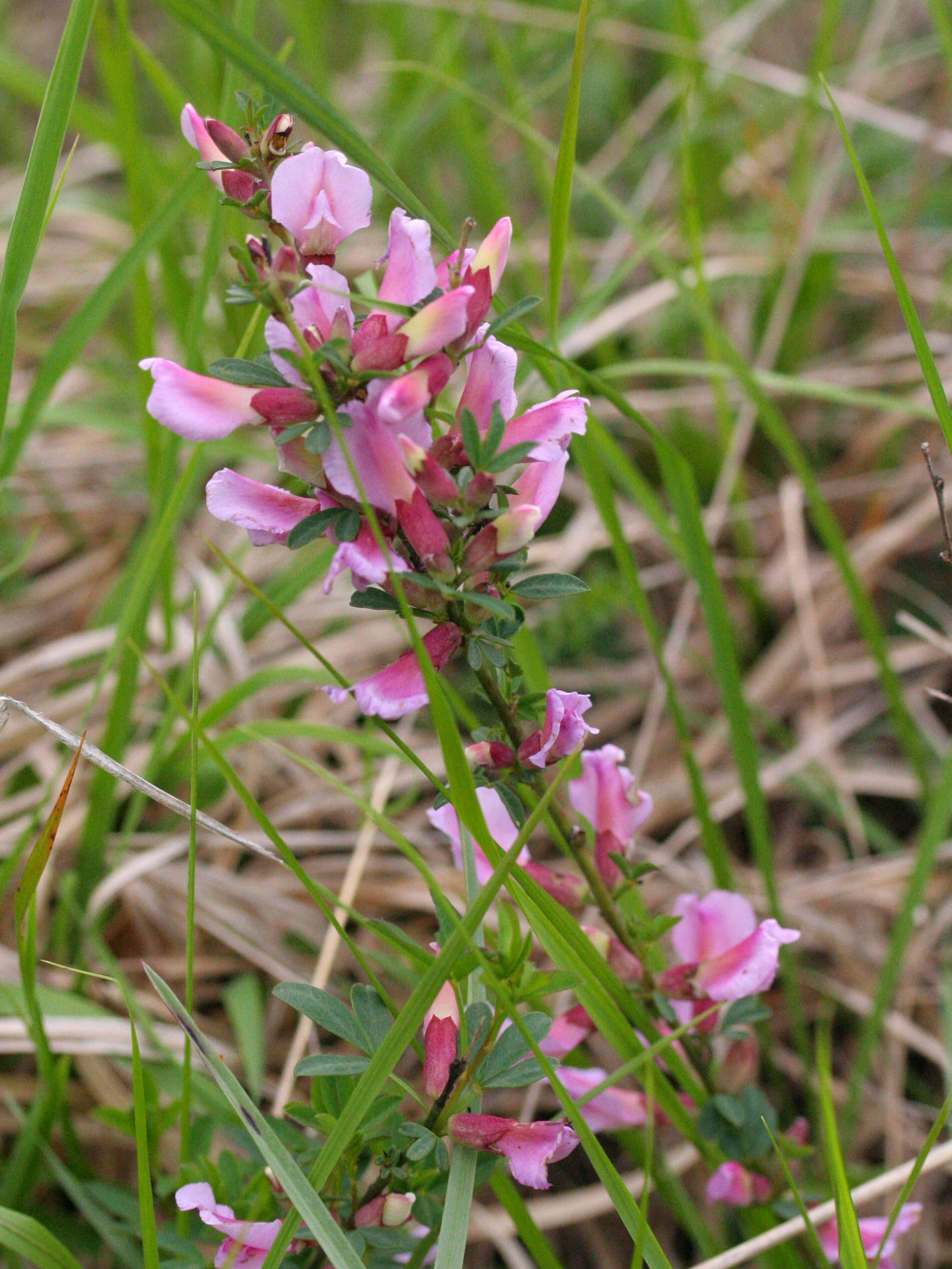 Chamaecytisus_purpureus (Citiso purpureo) Località Val Piana, Limana (BL), quota 850